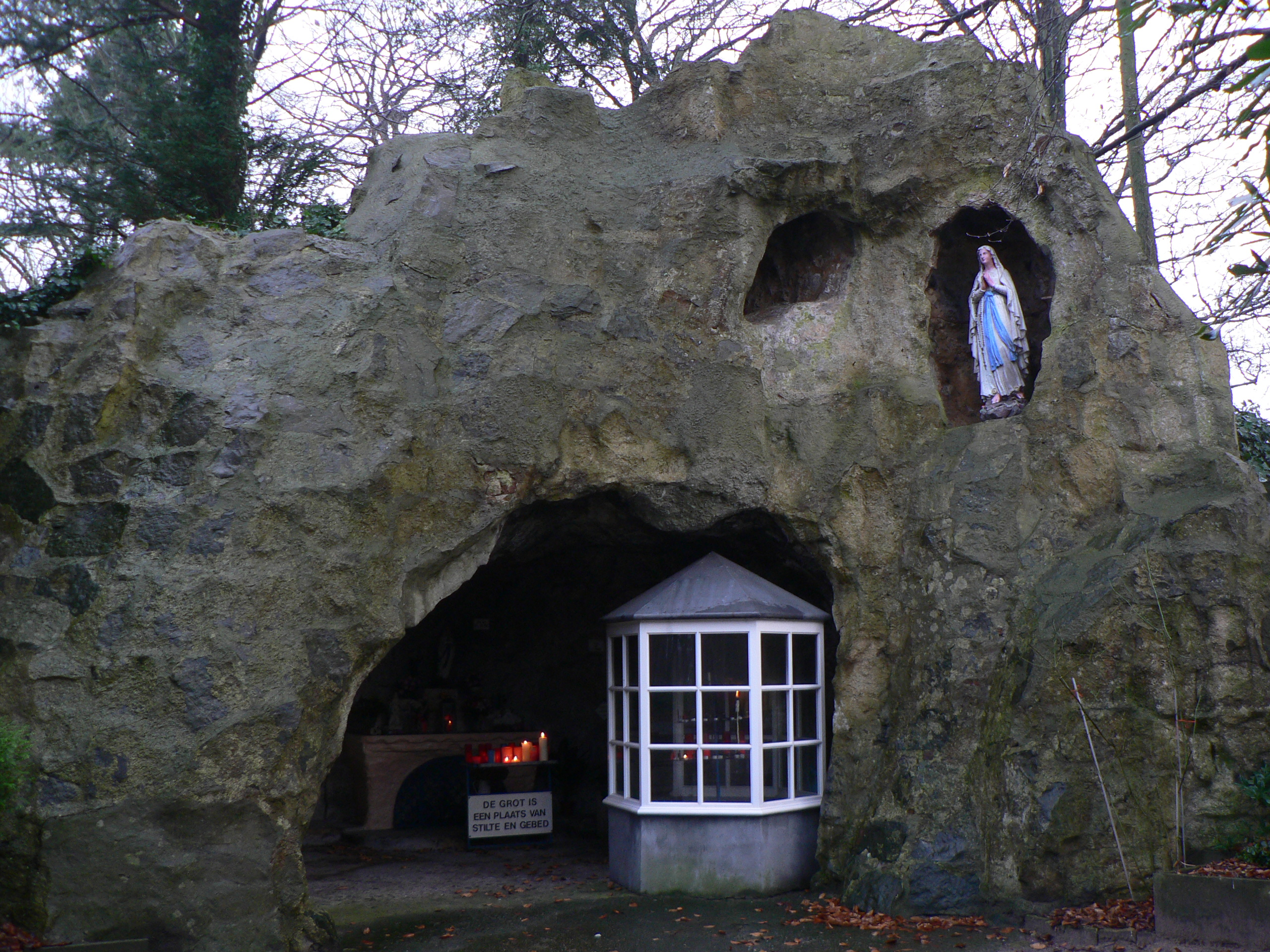 De Manlaan, Sint-Andries, Brugge - own picture